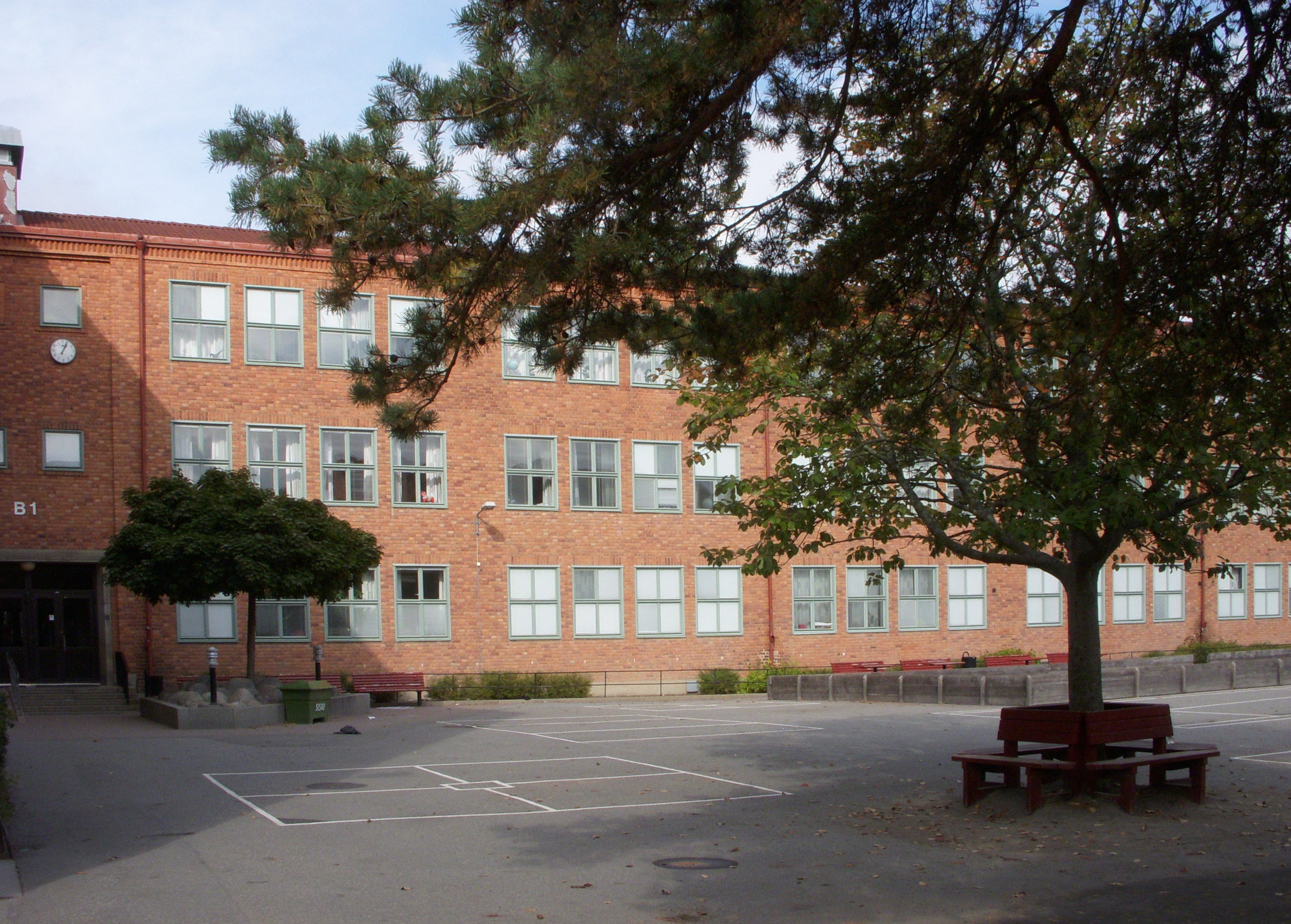 Hägerstensåsens skola, arkitekt Paul Hedqvist